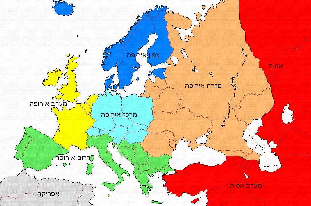 חלוקת אירופה לאזורים